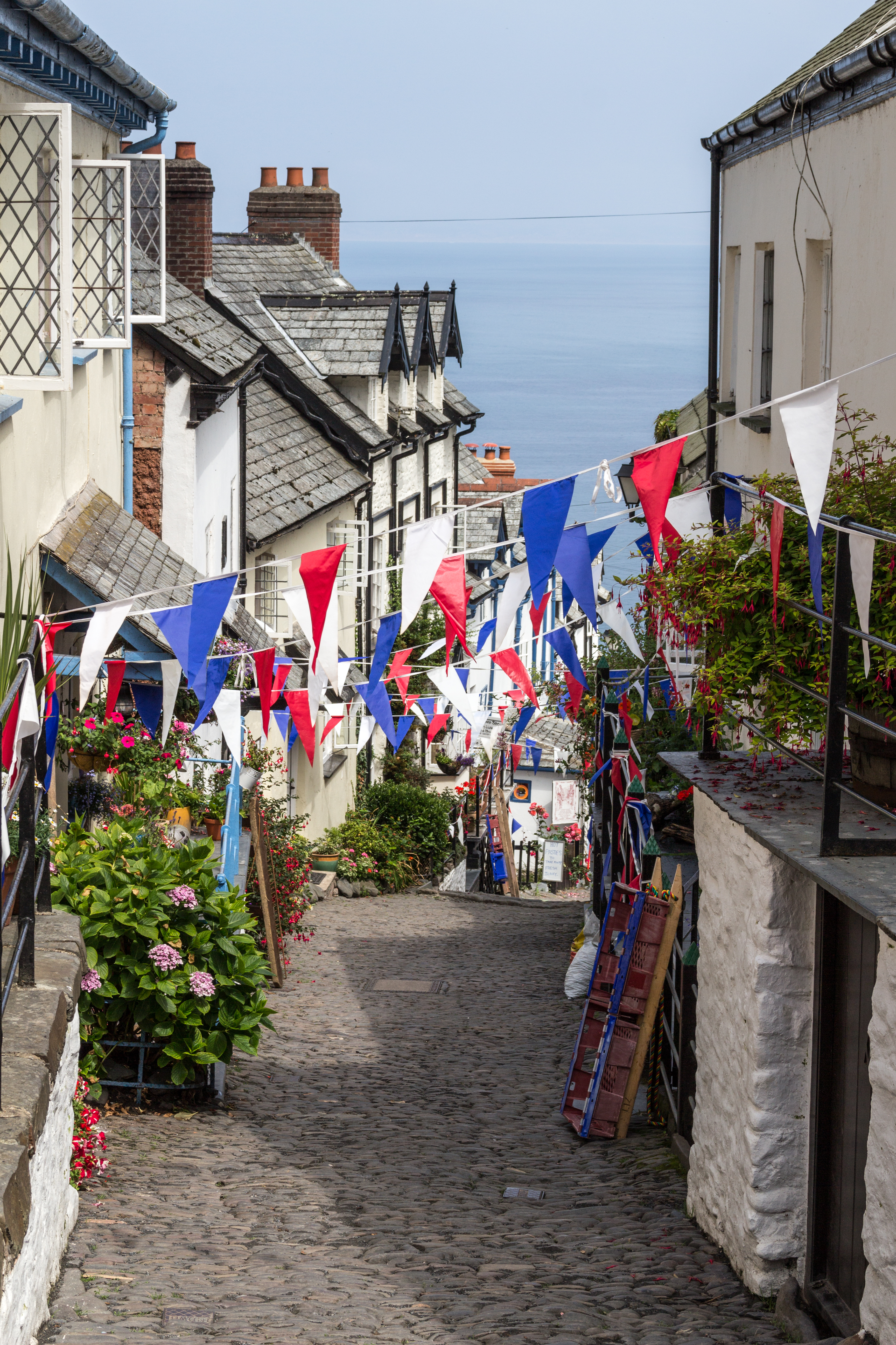 Street in Clovelly, Devon, England